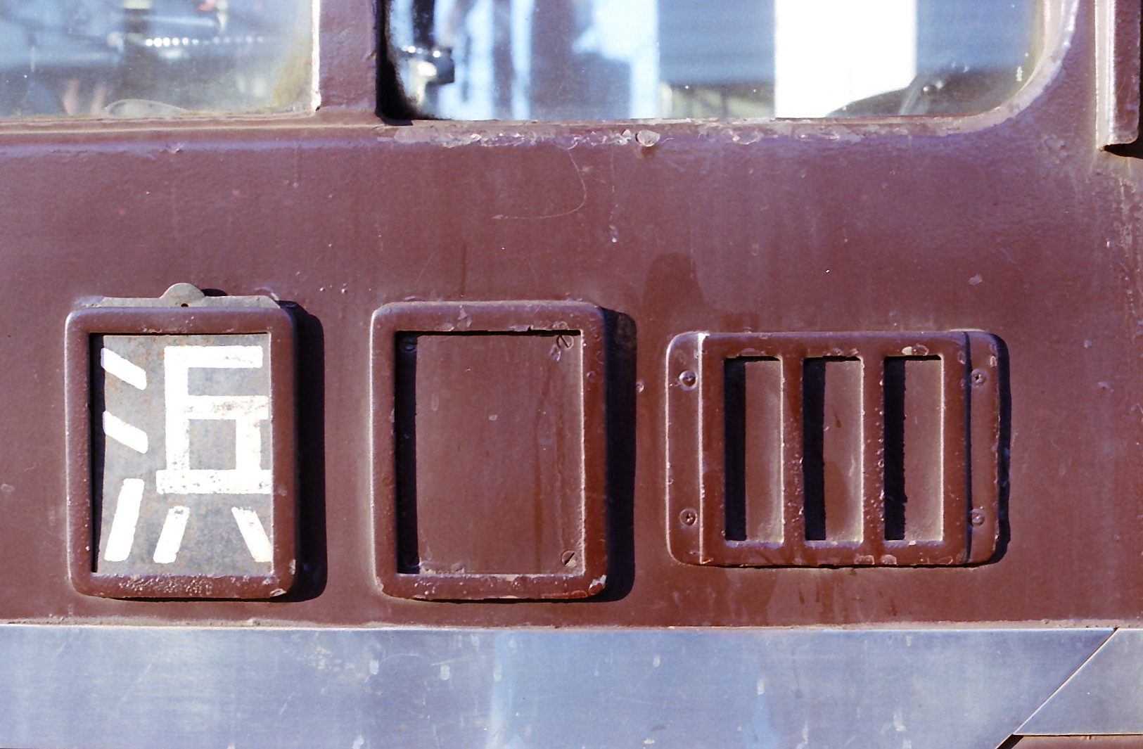 EF5860-京都駅